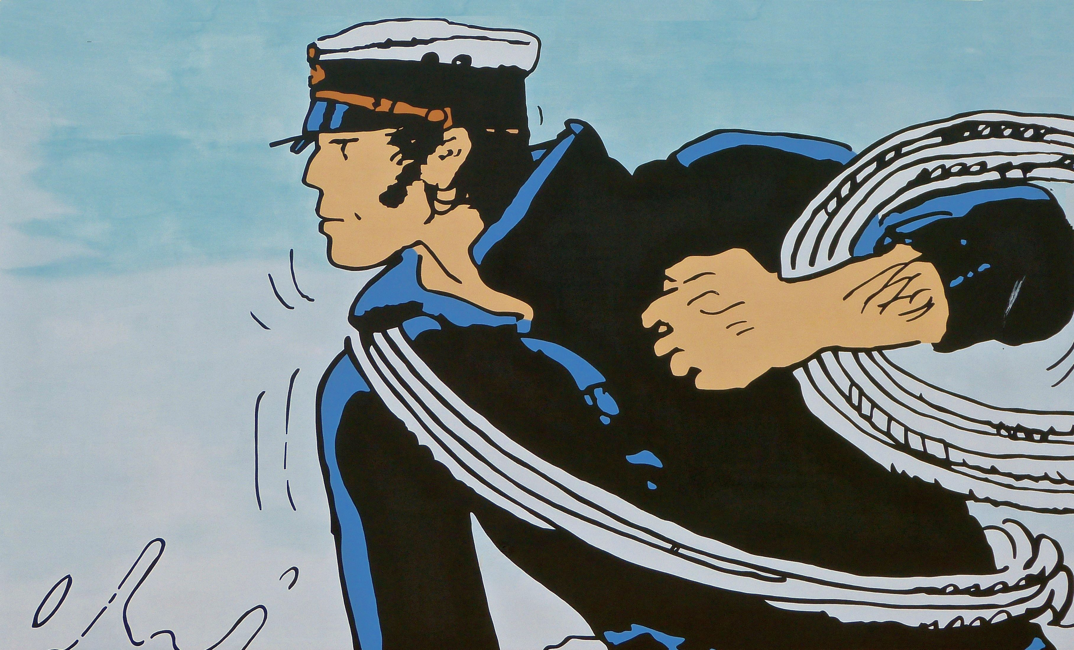 Stripmuur Corto Maltese te Brussel